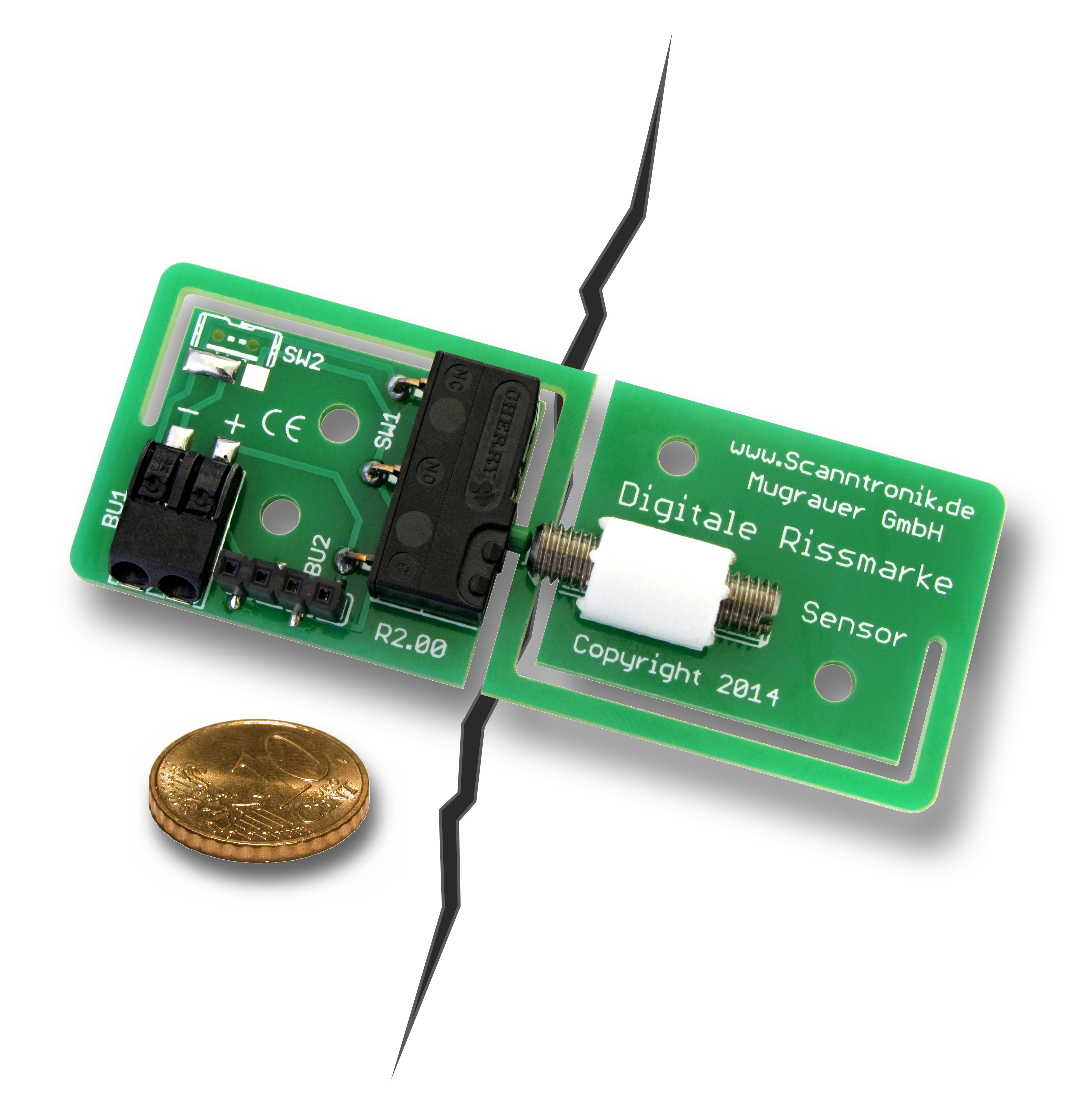 Digitale Gipsmarke / Rissmarke angebracht über einem Riss